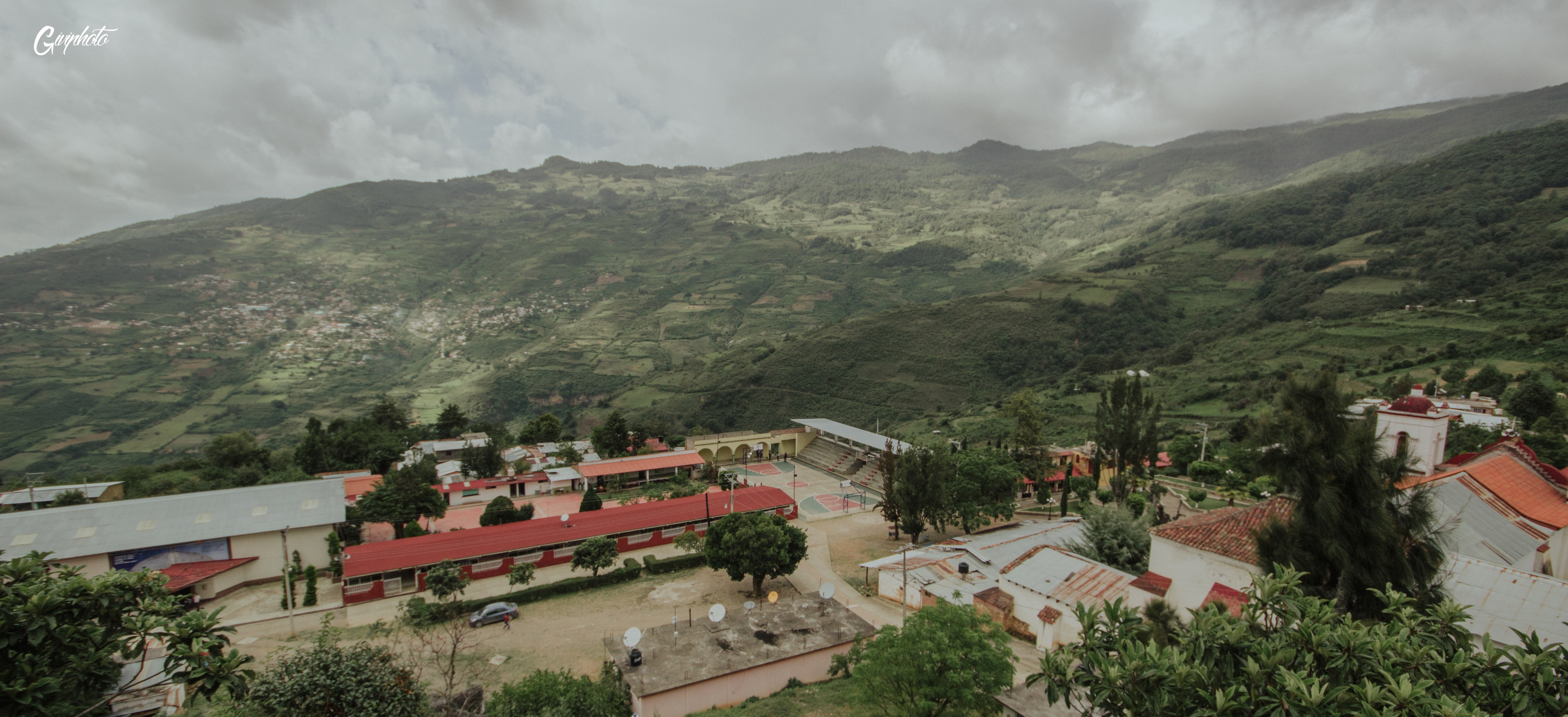 Analco desde el aire.